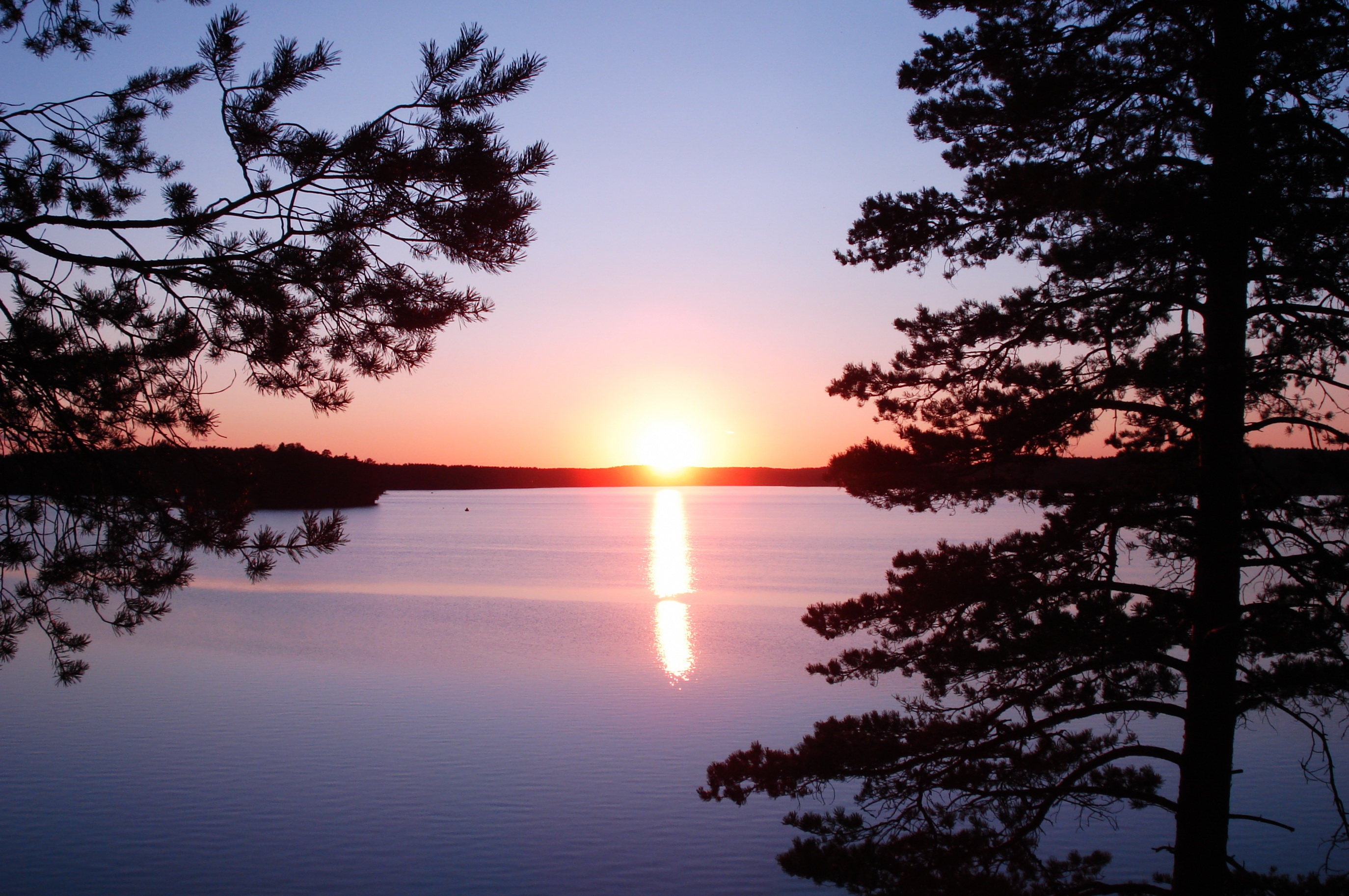 Озеро Зеркальное, Ленинградская область